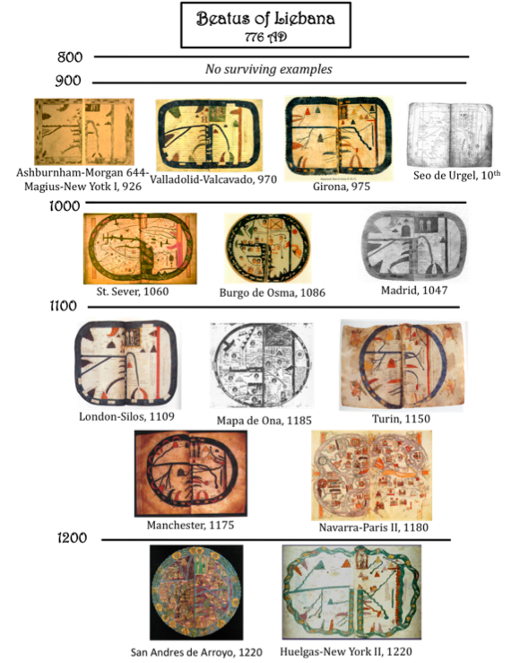 Seřazení map Beatova typu